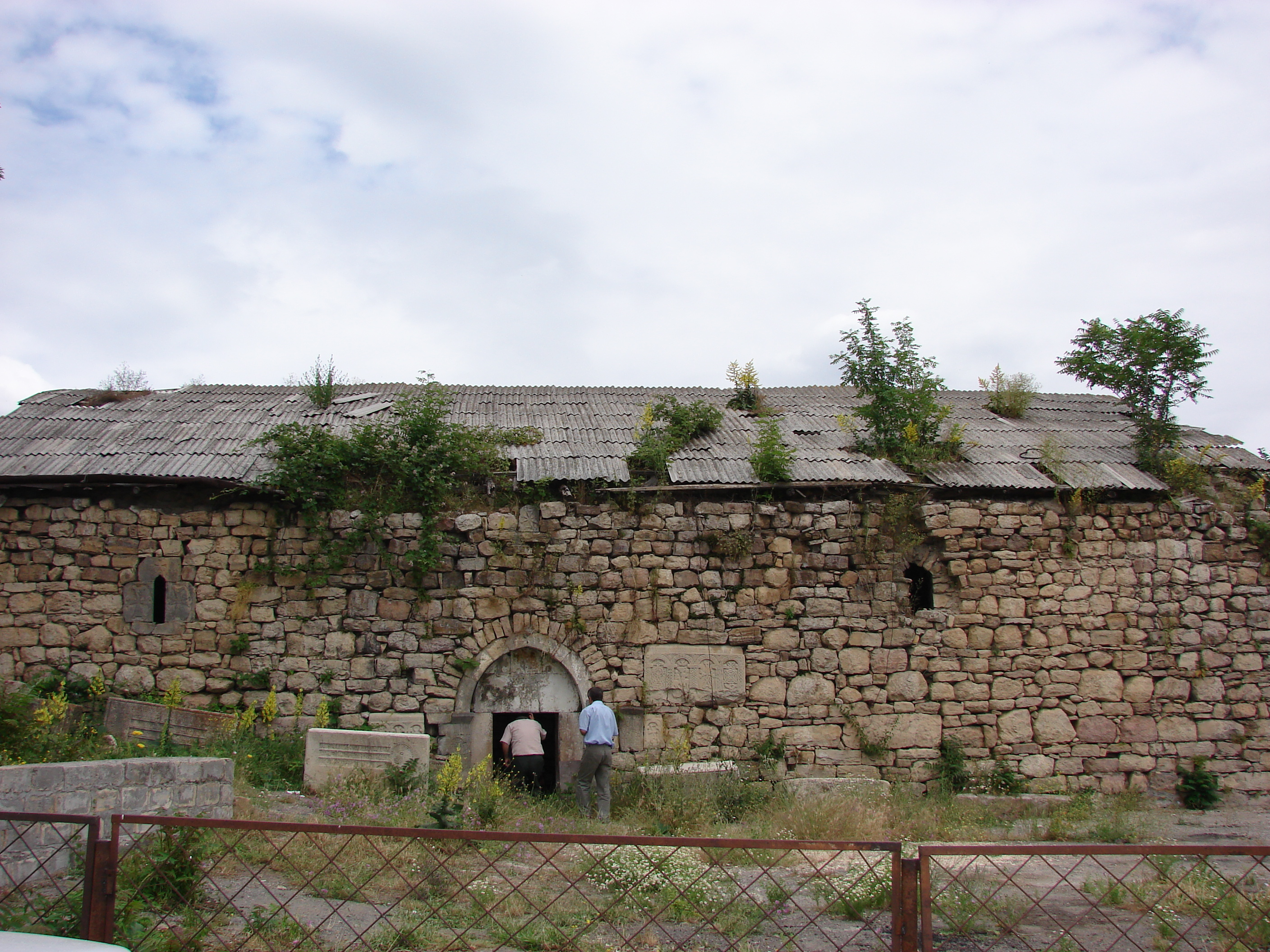 Եղվարդ գյուղի Սբ. Աստվածածին եկեղեցի-1, 1700 թվական 34/4